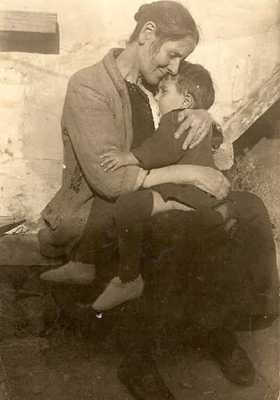 Майката на Христо Каварналиев, кърмеща бъдещия творец